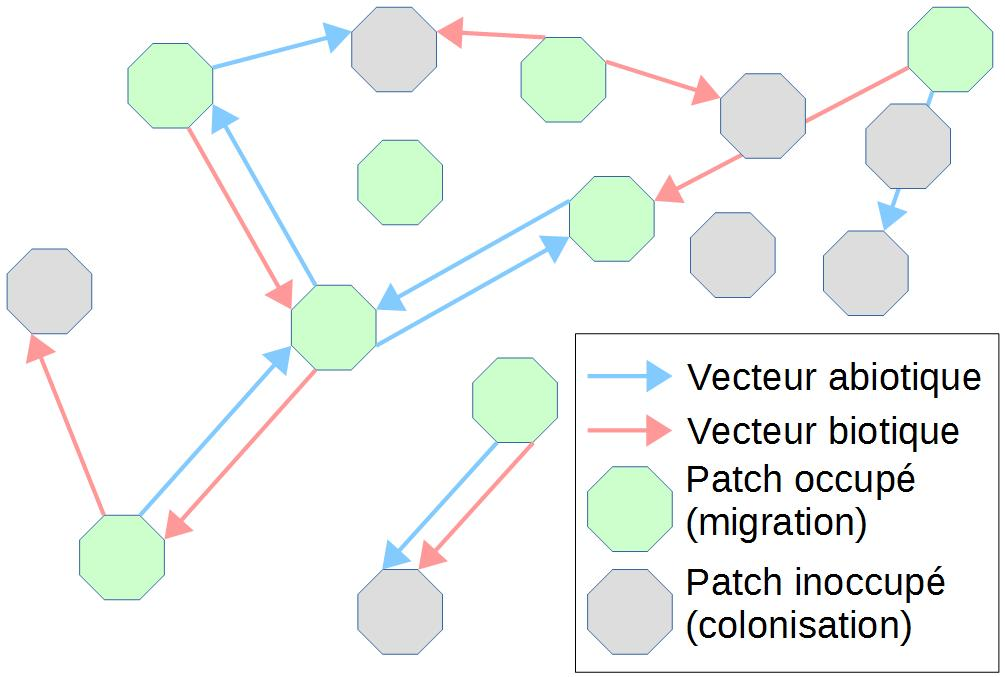 Schéma représentant la dispersion